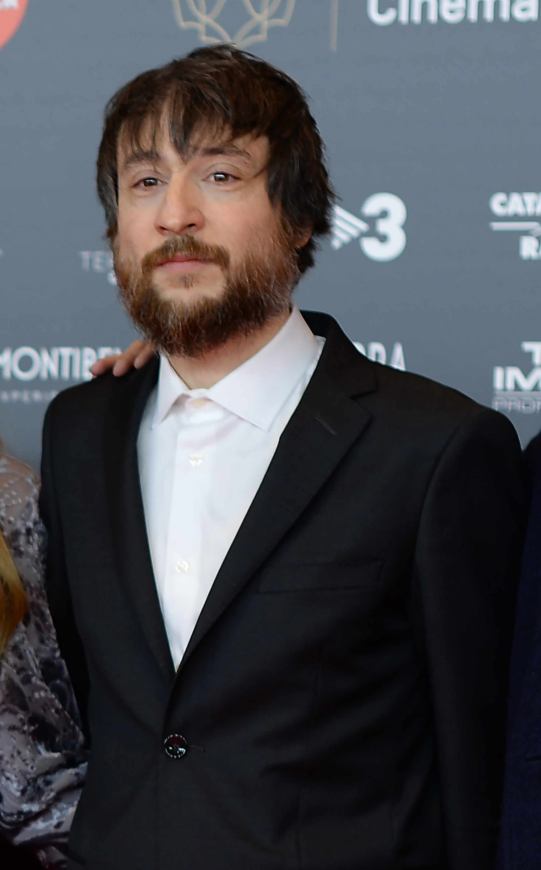 Raül Fernández, Refree, músic, XII Premis Gaudí (2020)